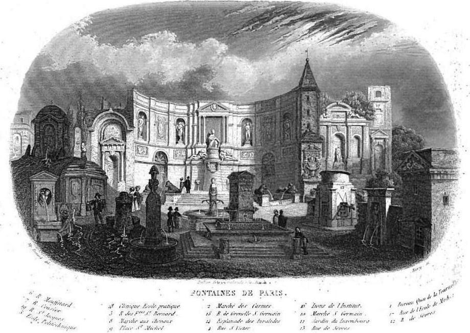 "Fontaines de Paris" [vue imaginaire juxtaposant plusieurs fontaines parisiennes devant la fontaine de Grenelle]